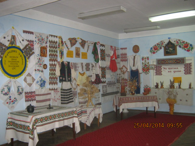 Бібліотечна краєзнавча світлиця "Із народних джерел"